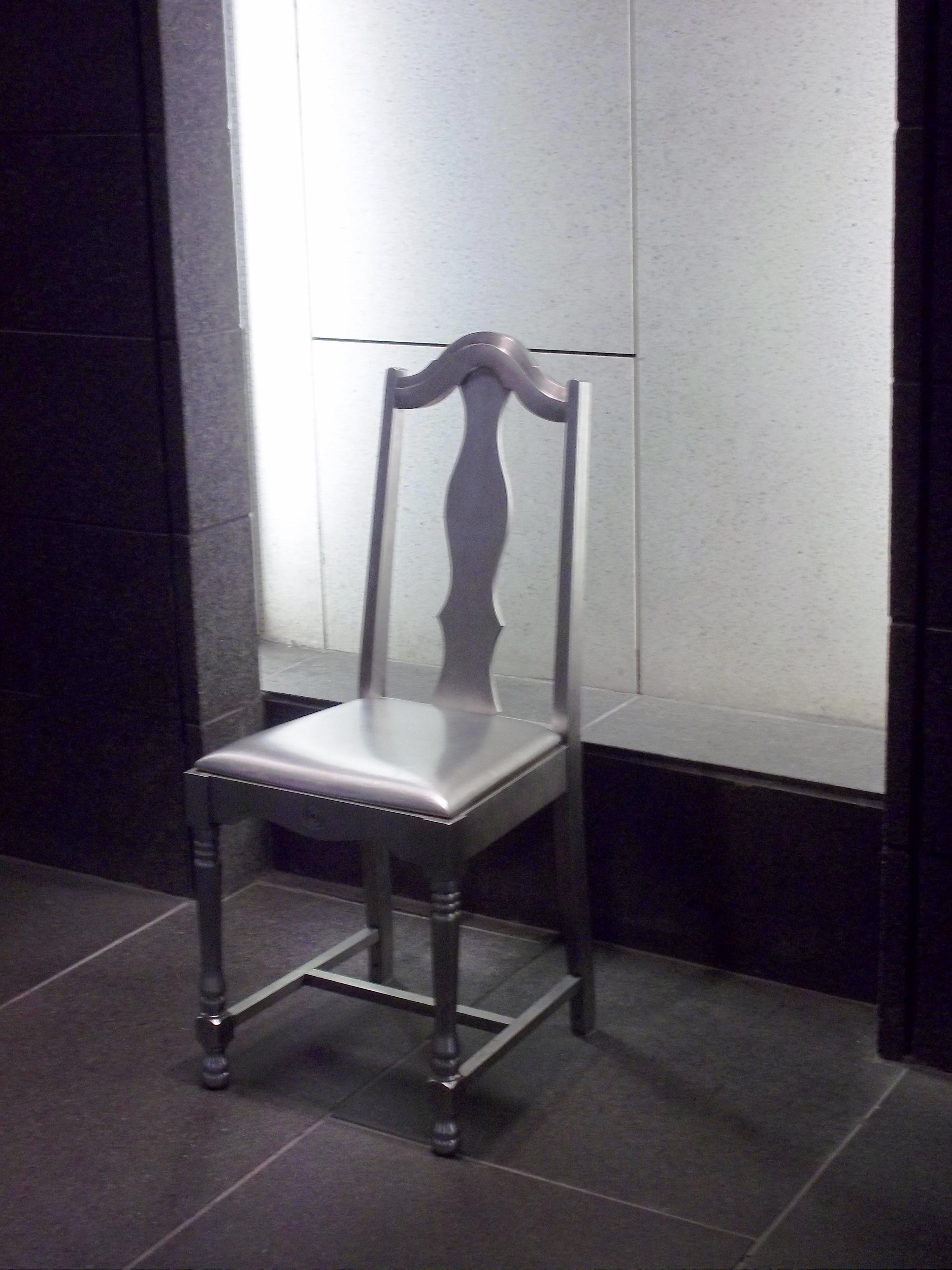 Sculpture de Michel Goulet intitulée Tables, de 2005. Elle est située dans le Montréal souterrain, dans le périmètre du Quartier international de Montréal, à l'entrée de la place Jean-Paul-Riopelle. « J'ai toujours privilégié dans mon travail l'usage d'objets issus du quotidien, des outils, du mobilier domestique mais aussi des signes qui, par convention sociale, sont des précis d'idées et de concepts. Je tiens pour acquis qu'une chaise ou la lettre « A », tout en étant réels, n'ont plus temporairement d'efficacité ou de valeur en soi, mais en tant que signes de quelque chose d'autre. La fonction symbolique de l'art est mieux servie par des associations d'images (ou d'objets) qui animent l'esprit que par celles qui illustrent ou racontent. »